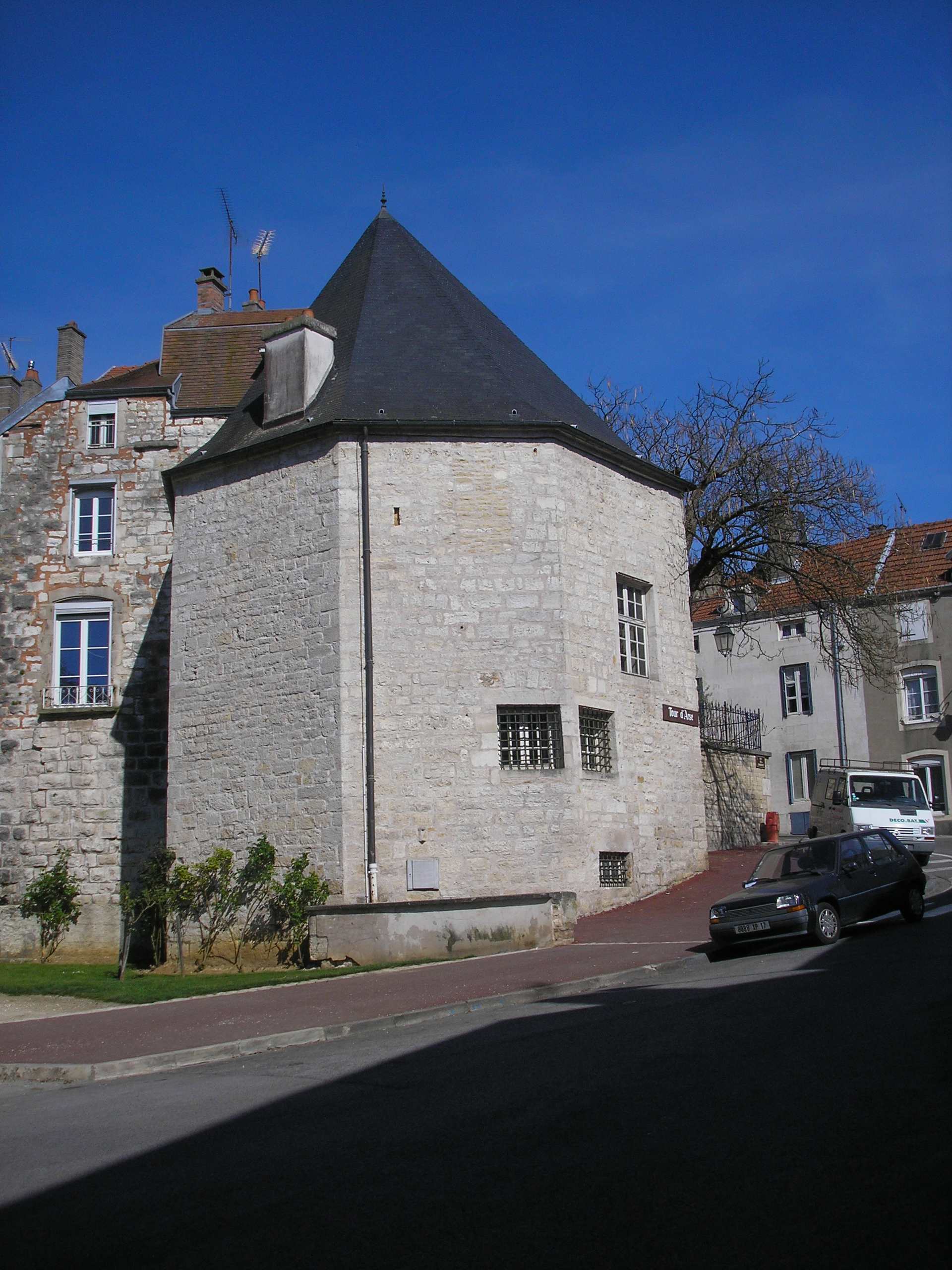 Tour d'Arse à Chaumont (Haute-Marne) 52000